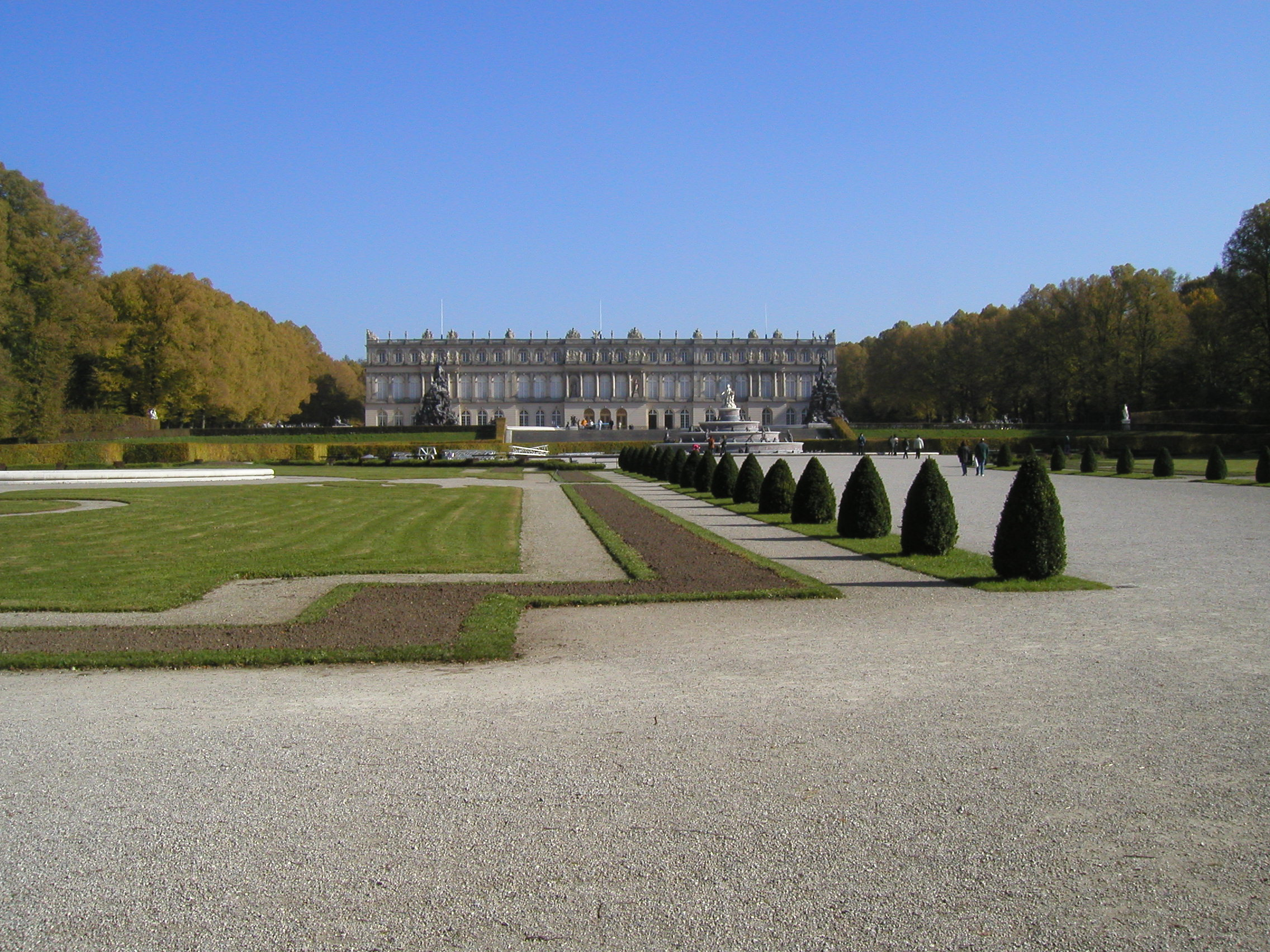 Herrenchiemsee.